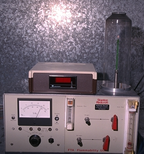 Messgerät zur Bestimmung des Sauerstoffindex nach DIN EN ISO 4589